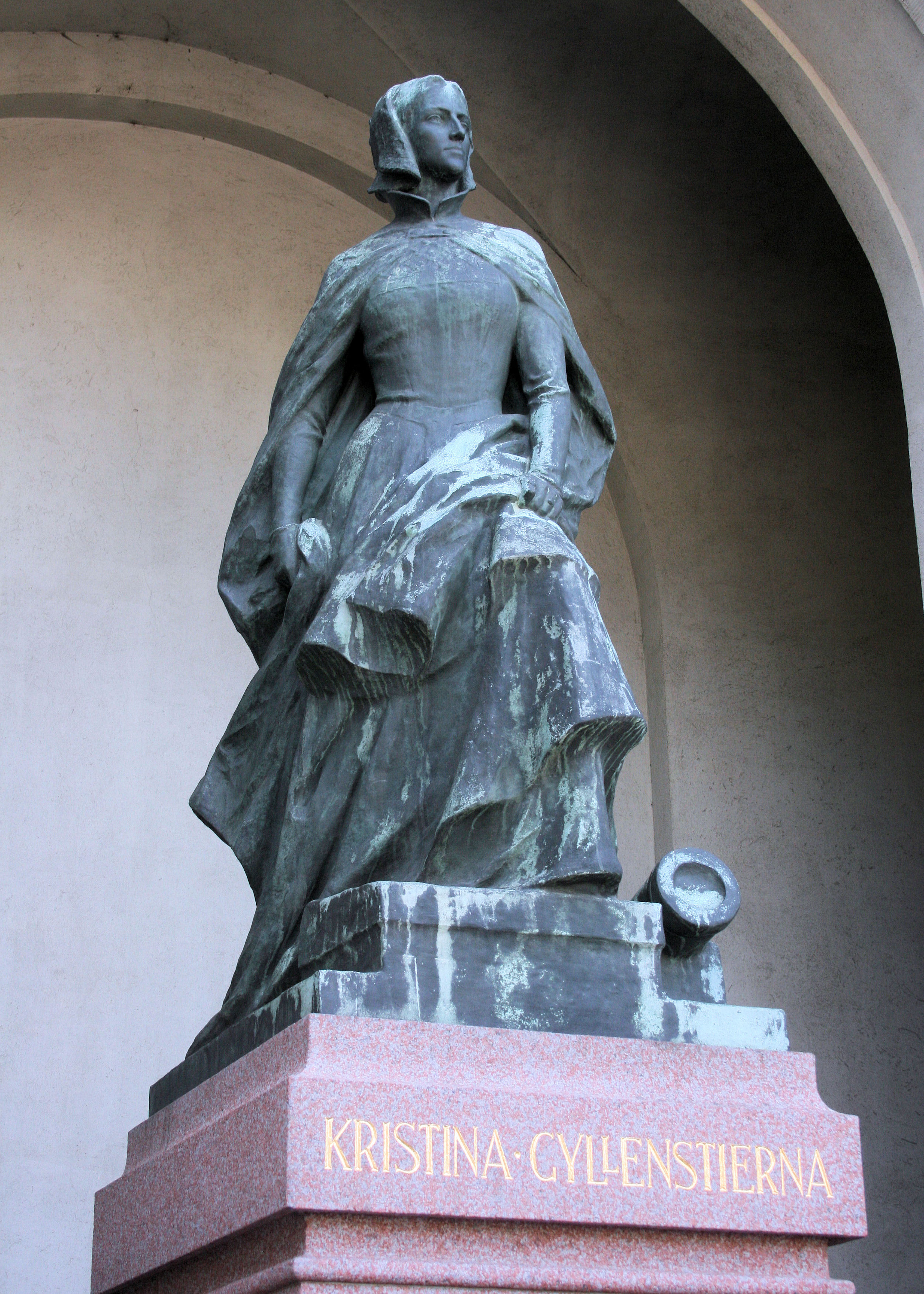 Denkmal_Christina_Gyllenstierna in Stockholm